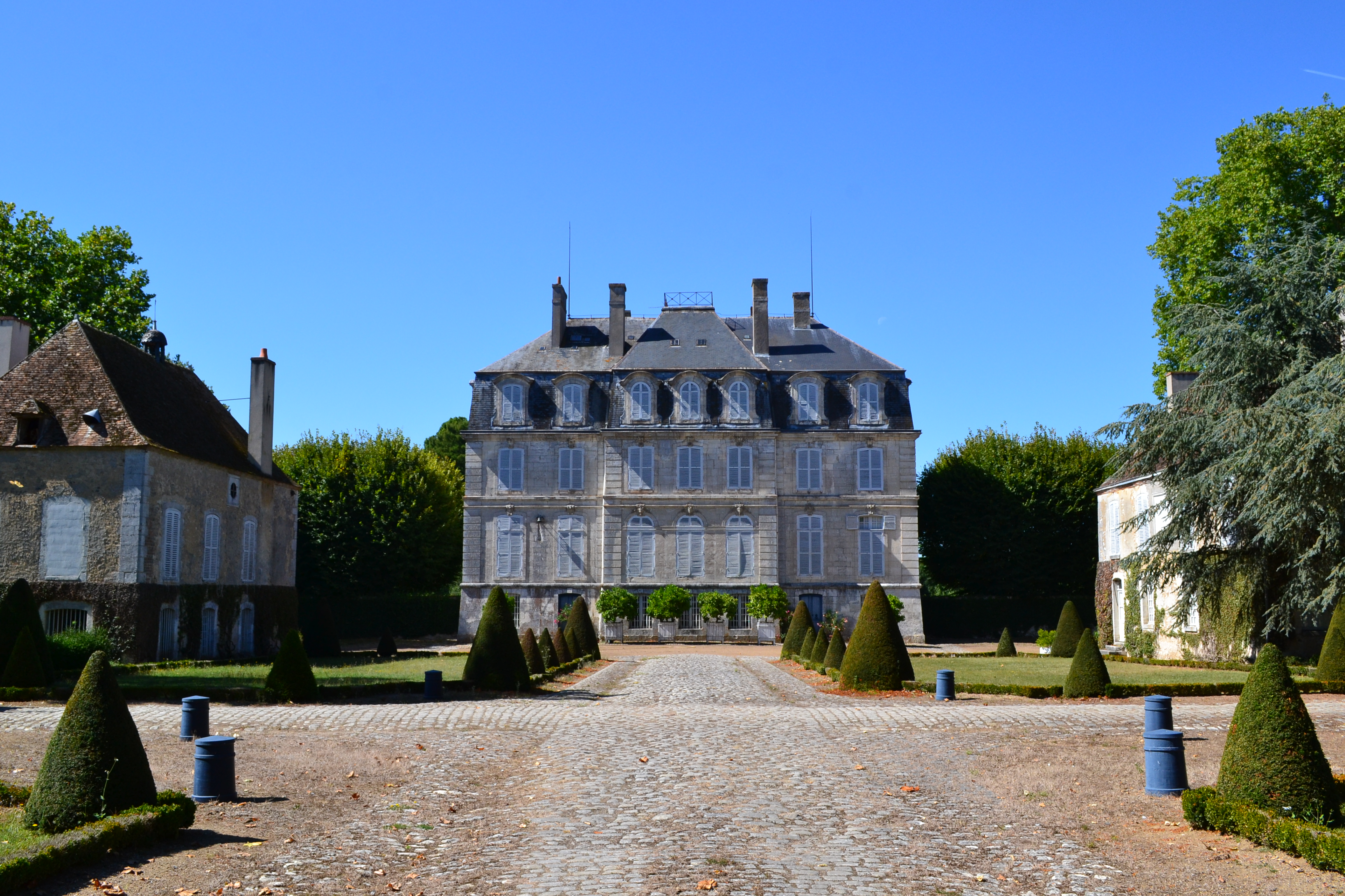 L'intérêt du château de Meslay tient à son site, à son architecture et à son histoire. Implanté dans un site remarquable en bordure de Loir, le château de Meslay, par l'harmonie de ses proportions, la sobriété des moyens employés, la délicatesse de son décor sculpté, est un édifice caractéristique du style régence, édifié de 1732 à 1735. Son architecte, Jules-Michel Hardouin, s'inscrit dans la lignée de Jules Hardouin et de Jacques Gabriel. Le château de Meslay a fait l'objet d'un véritable projet d'urbanisme. Village et château ont été reconstruits simultanément constituant un ensemble cohérent. Le parc est enclos de murs.